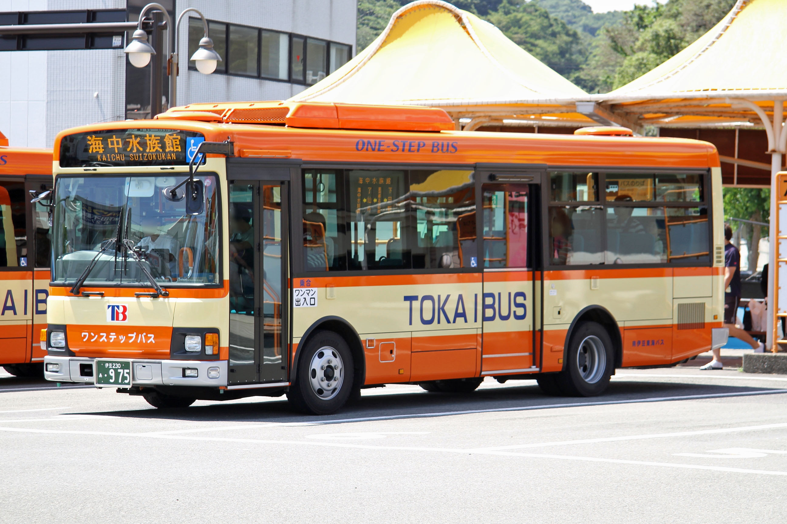 Minamiizu Tokai Bus car 南伊豆東海バスの車両